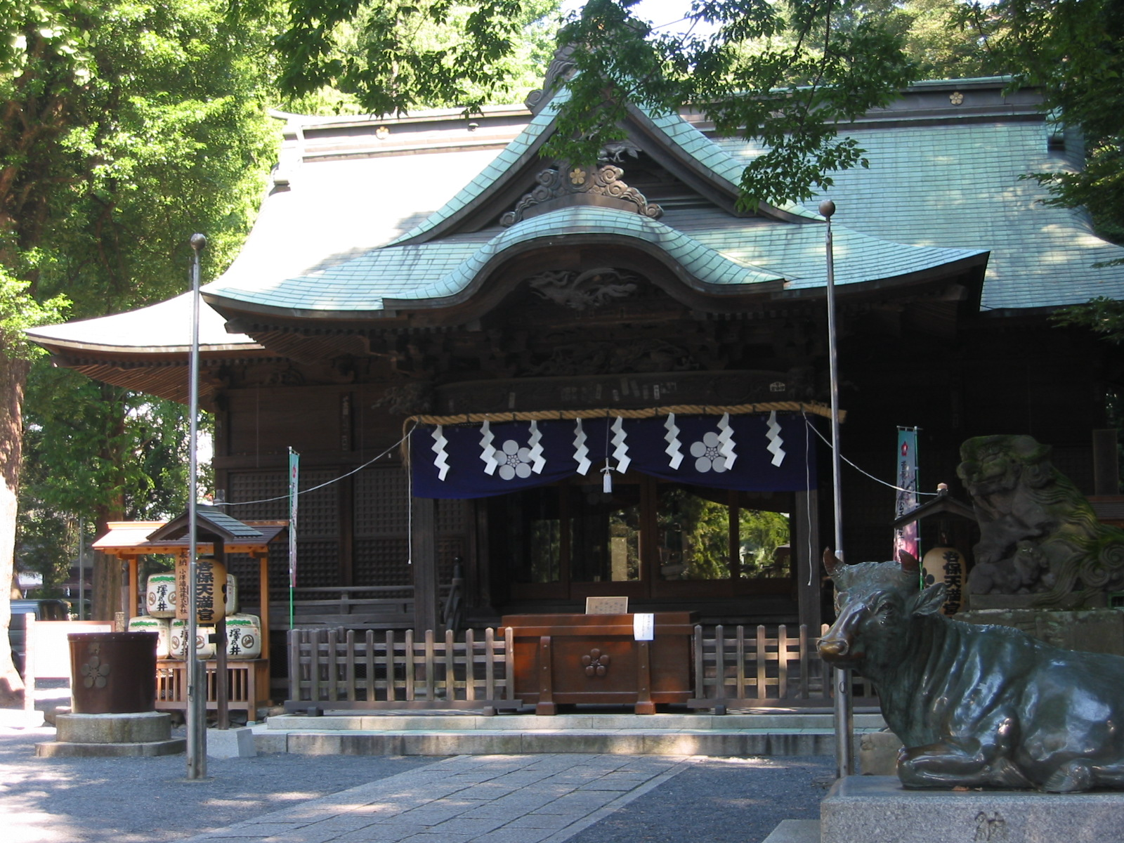 Yaho Tenmangu in Kunitachi city, Tokyo, Japan